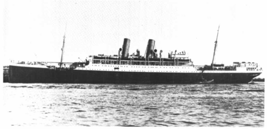 Der Dampfer Blücher der Hapag